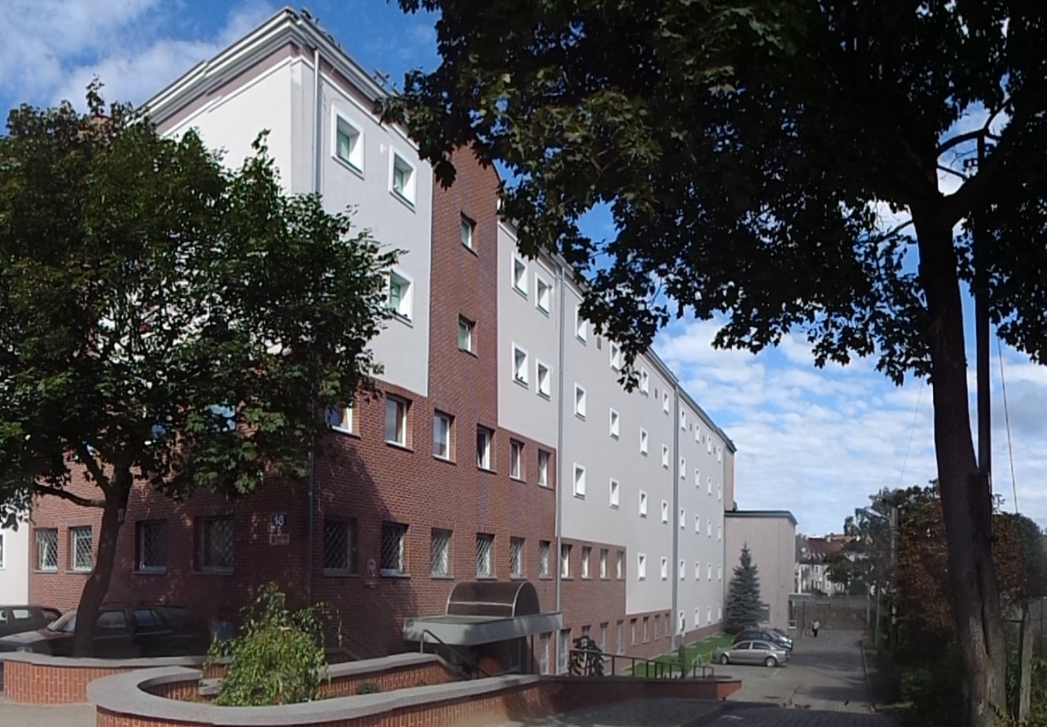 Archiwum Państwowe w Olsztynie